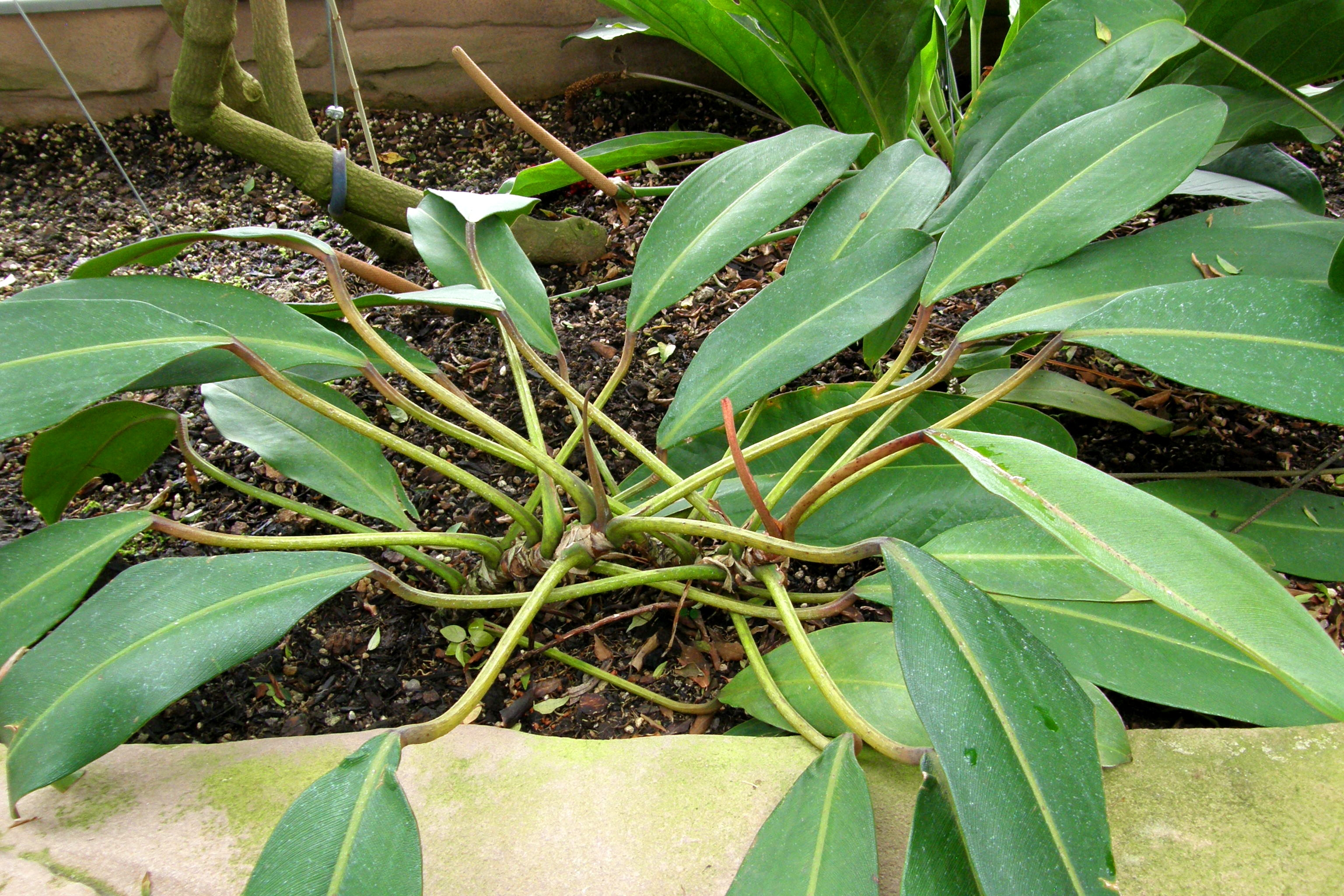 Philodendron callosum K. Krause